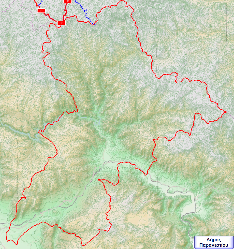 Τοπογραφικός χάρτης του Δήμου Παρανεστίου (2011)